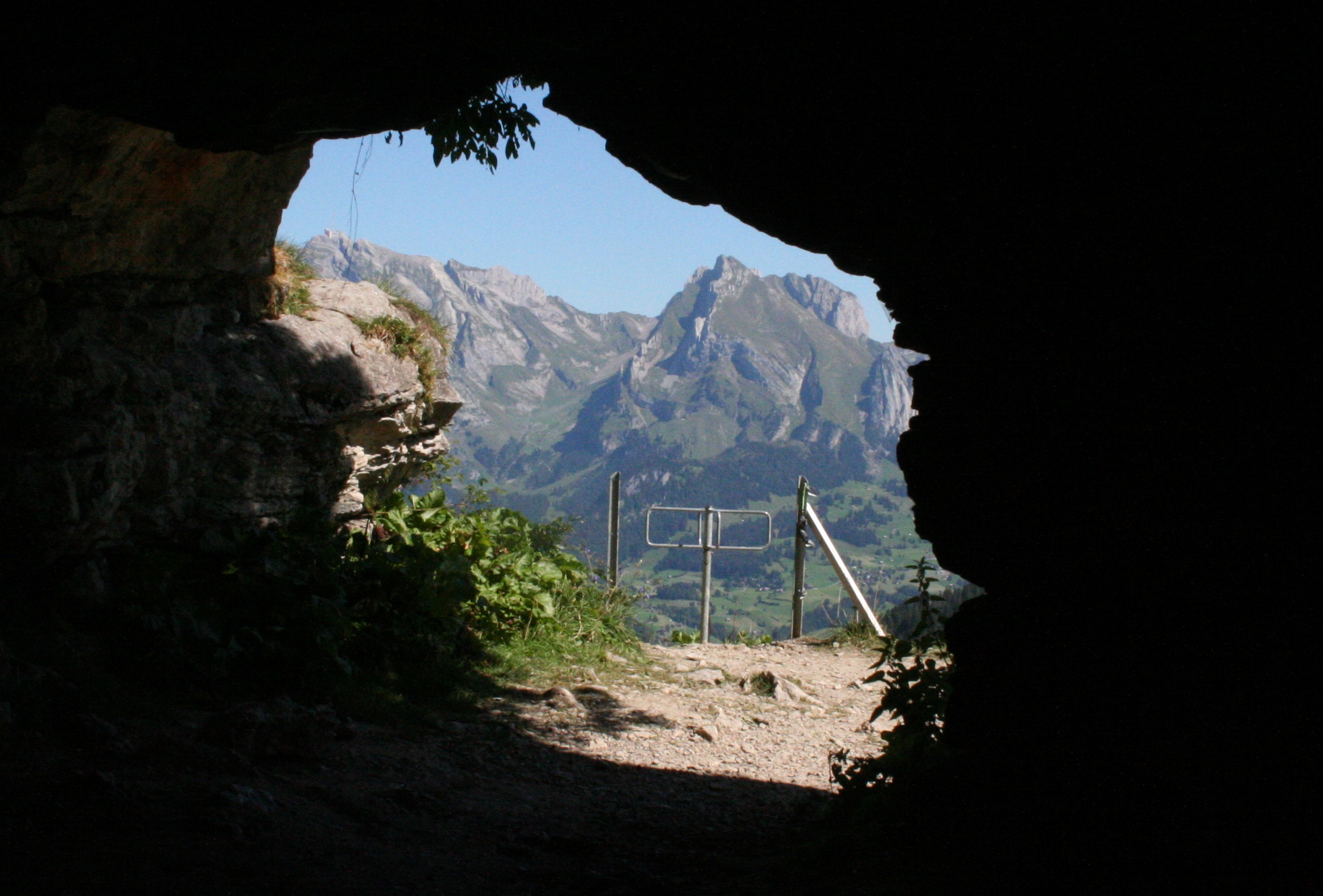 im Wildmannlisloch